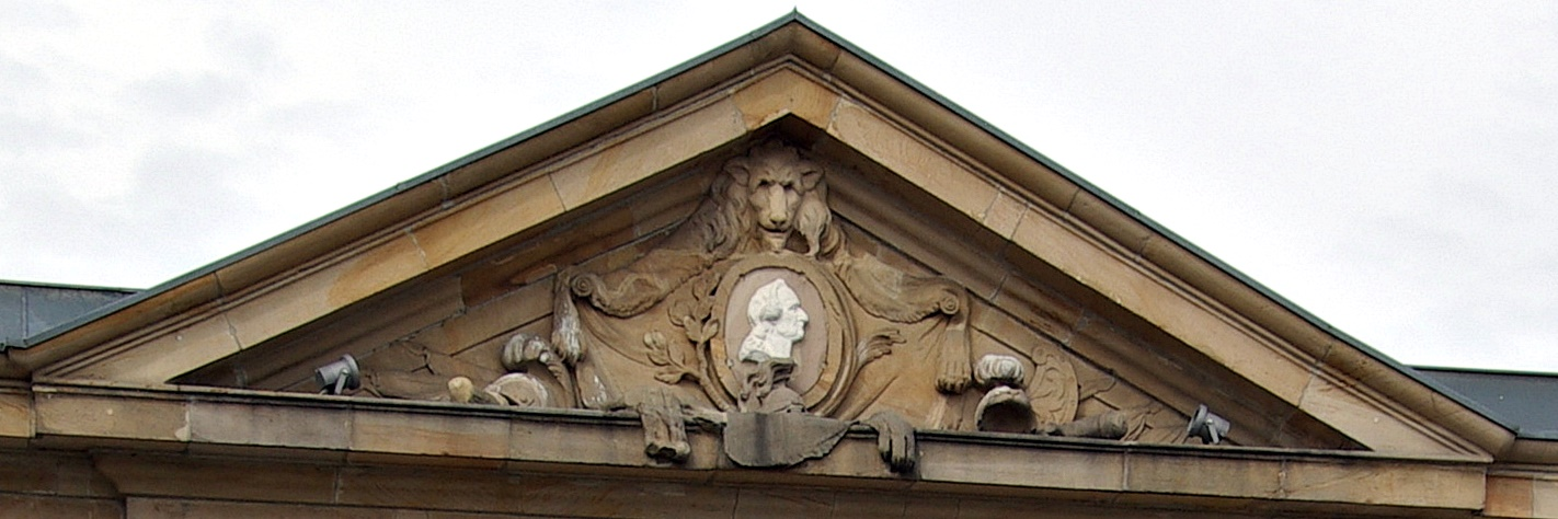 Frankenthal Wormser Tor Giebelfeld Stadtseite